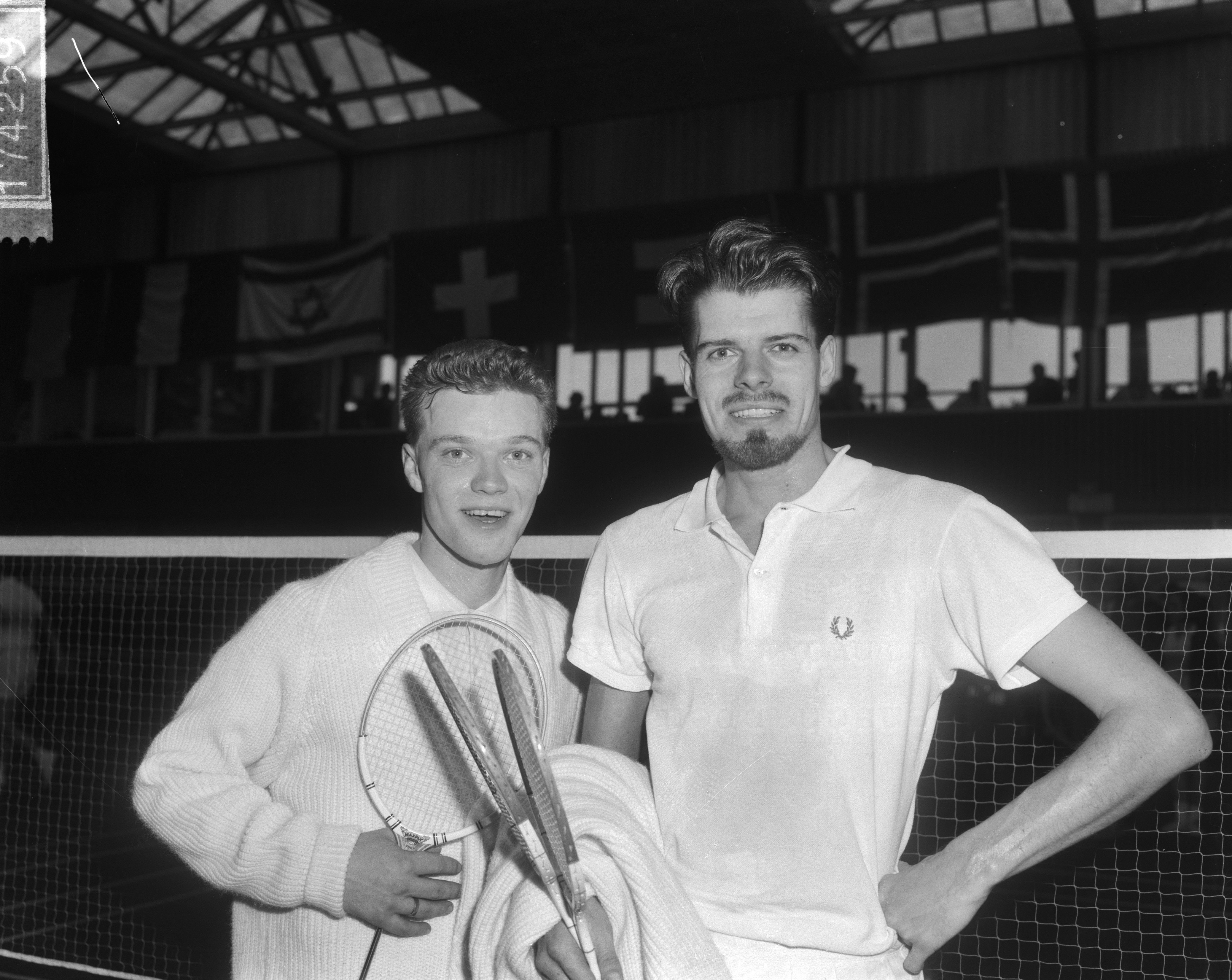 Collectie / Archief : Fotocollectie Anefo Reportage / Serie : [ onbekend ] Beschrijving : Internationale badmintonkampioenschappen te Haarlem, winnaar bij de heren links Tom Bacher. On the right side probably Bendt Rose, opponent of Tom Bacher in the final. Indications: Same logo like the other Danish players on shirt. Denmark was at the the 1965 Dutch Open with the following men: Bendt Rose, Tom Bacher, Ole Mertz, Klaus Kaagaard, Jörgen Herlevsen according to Limburgsch dagblad, 03-02-1965. Datum : 13 februari 1965 Locatie : Haarlem Trefwoorden : Badminton, Winnaars, kampioenschappen Persoonsnaam : Tom Bacher Fotograaf : Bilsen, Joop van / Anefo Auteursrechthebbende : Nationaal Archief Materiaalsoort : Negatief (zwart/wit) Nummer archiefinventaris : bekijk toegang 2.24.01.04 Bestanddeelnummer : 917-4259